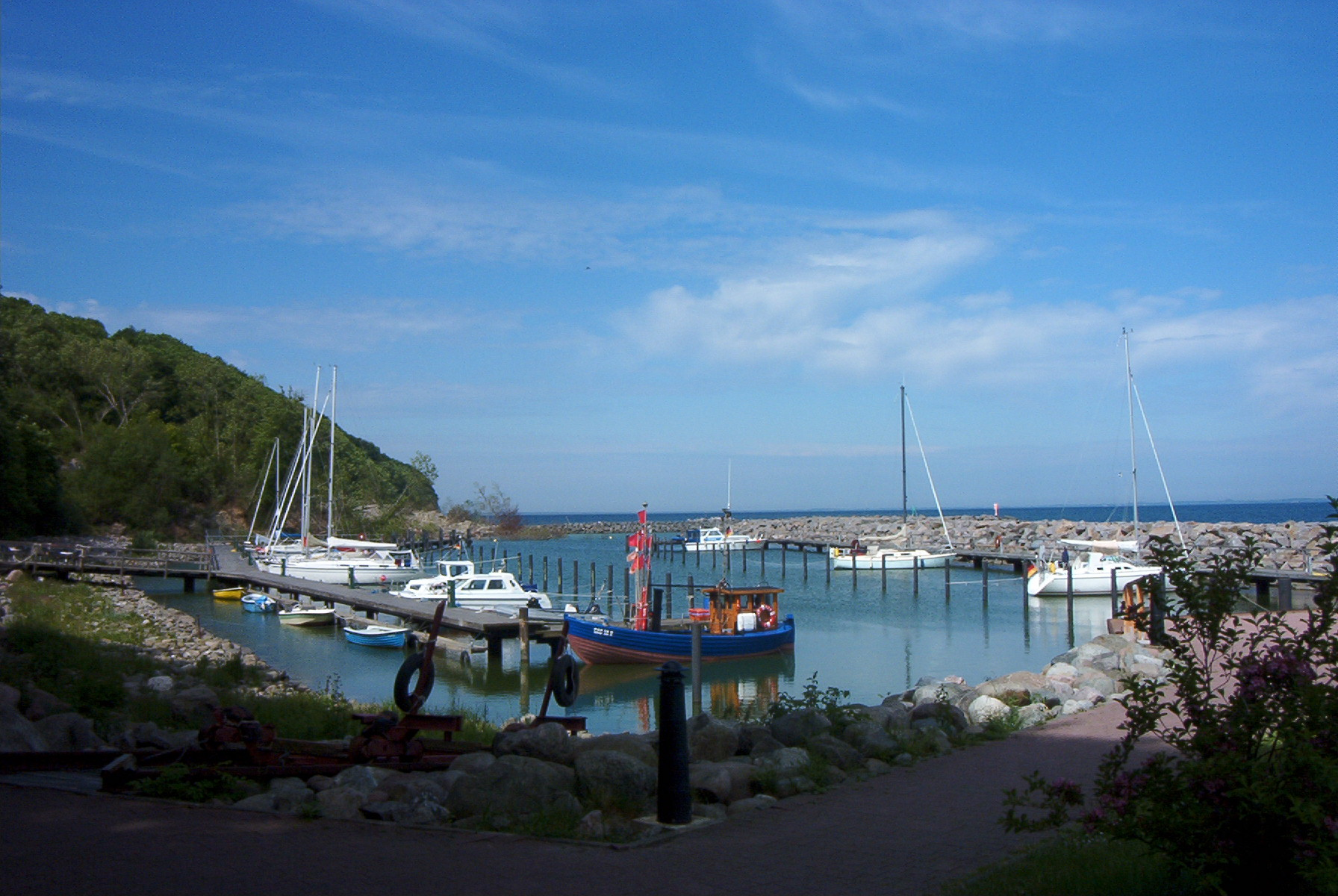 Rügen: Lohme, Hafen, im Hintergrund ist der im Frühjahr 2005 abgerutschte Teil der Steilküste zu sehen